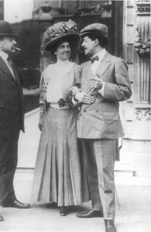 Luise von Österreich-Toskana (1870–1947) und Enrico Toselli (1883–1926)